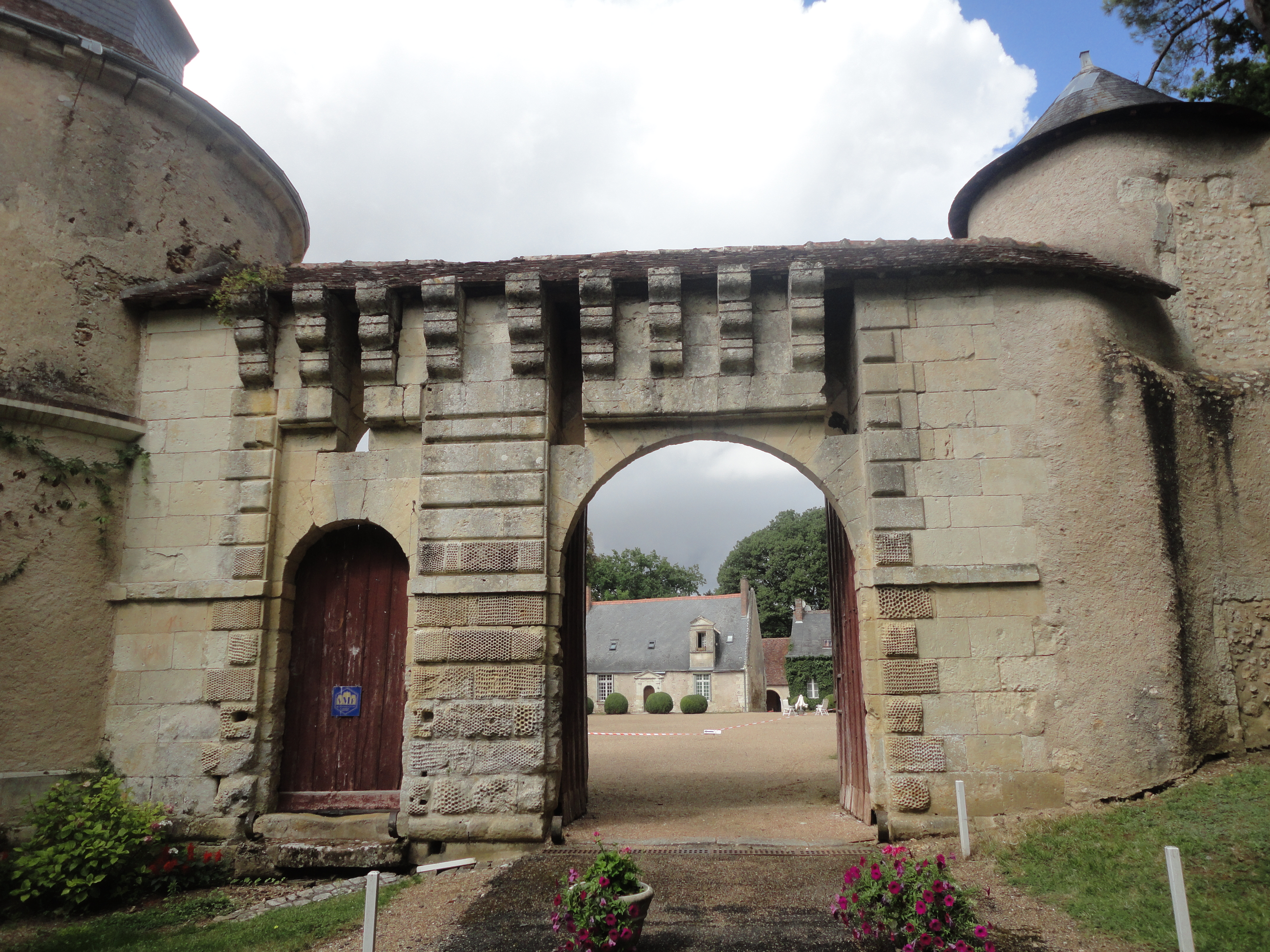 L'entrée du château de la Vallière à Reugny